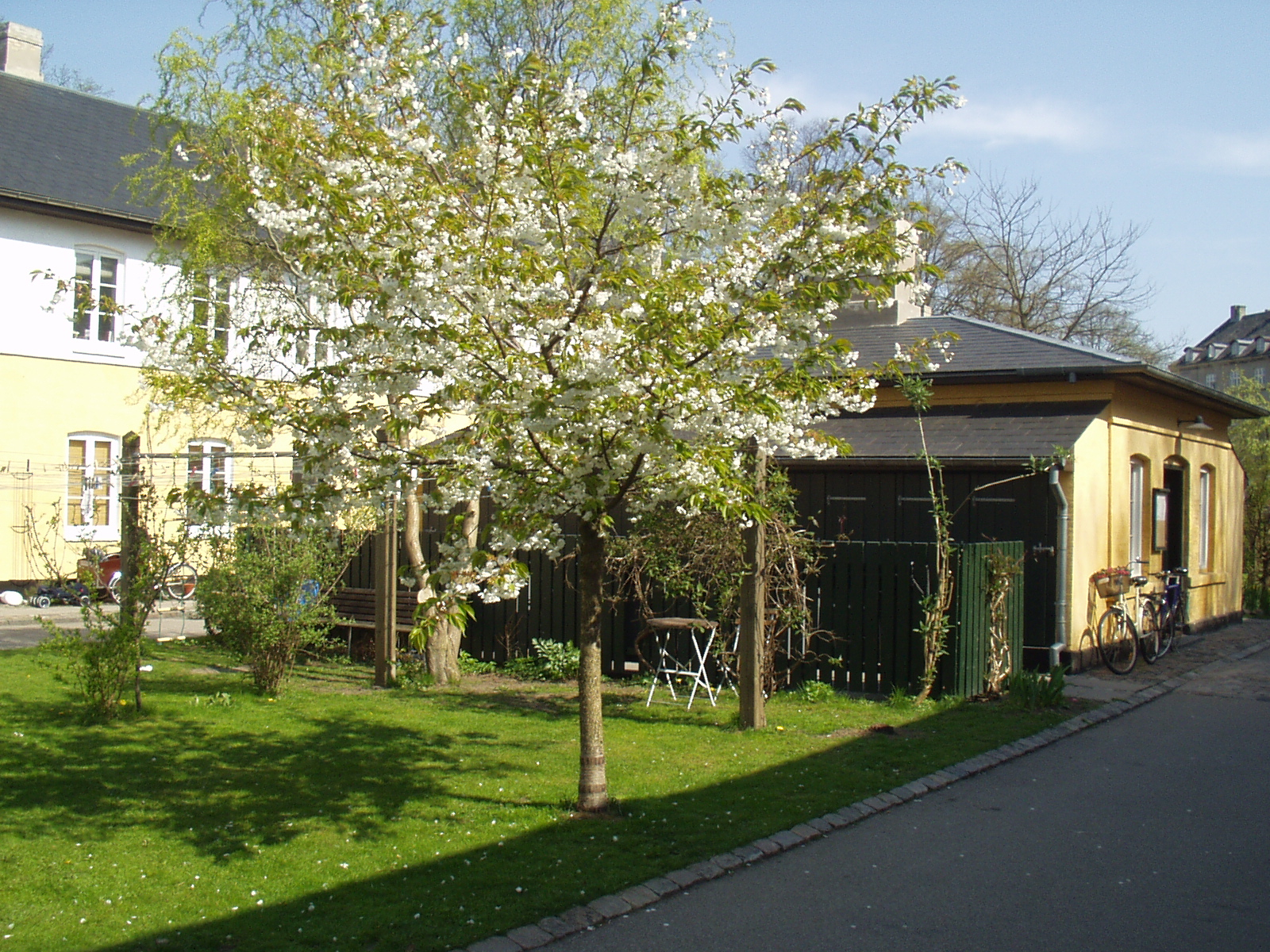 Billede af tørreplads med vaskehus i Brumleby